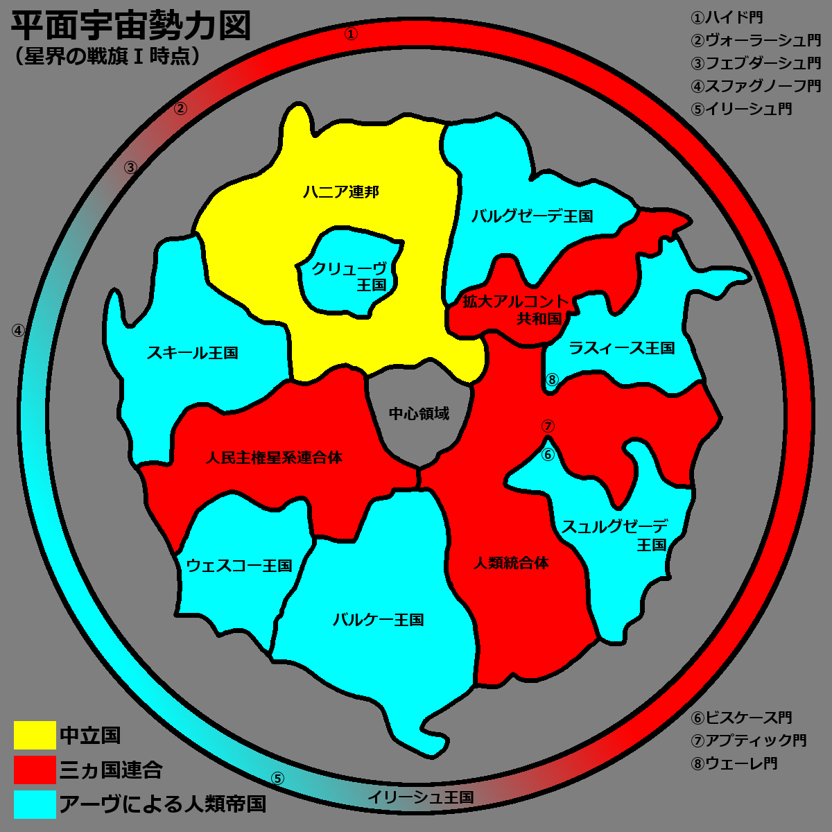 星界シリーズにおける平面宇宙勢力図。星界の戦旗第一部開始時点のもの。